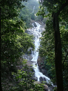 Mollem NP - Tamdi Falls